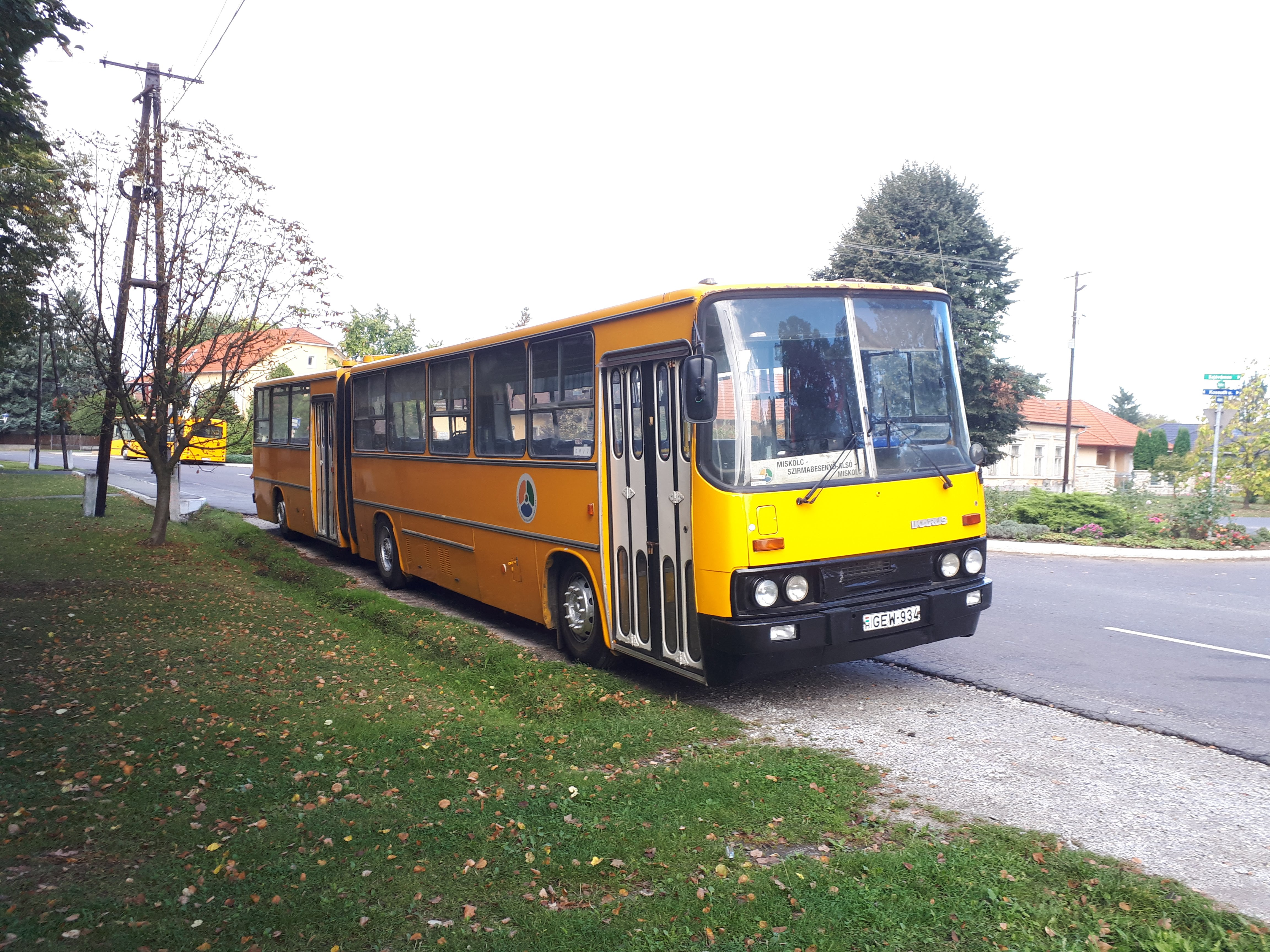 Az ÉMKK GEW-934 rendszámú Ikarus 280 típusú busza Szirmabesenyőn, a 3700-as helyközi járaton.